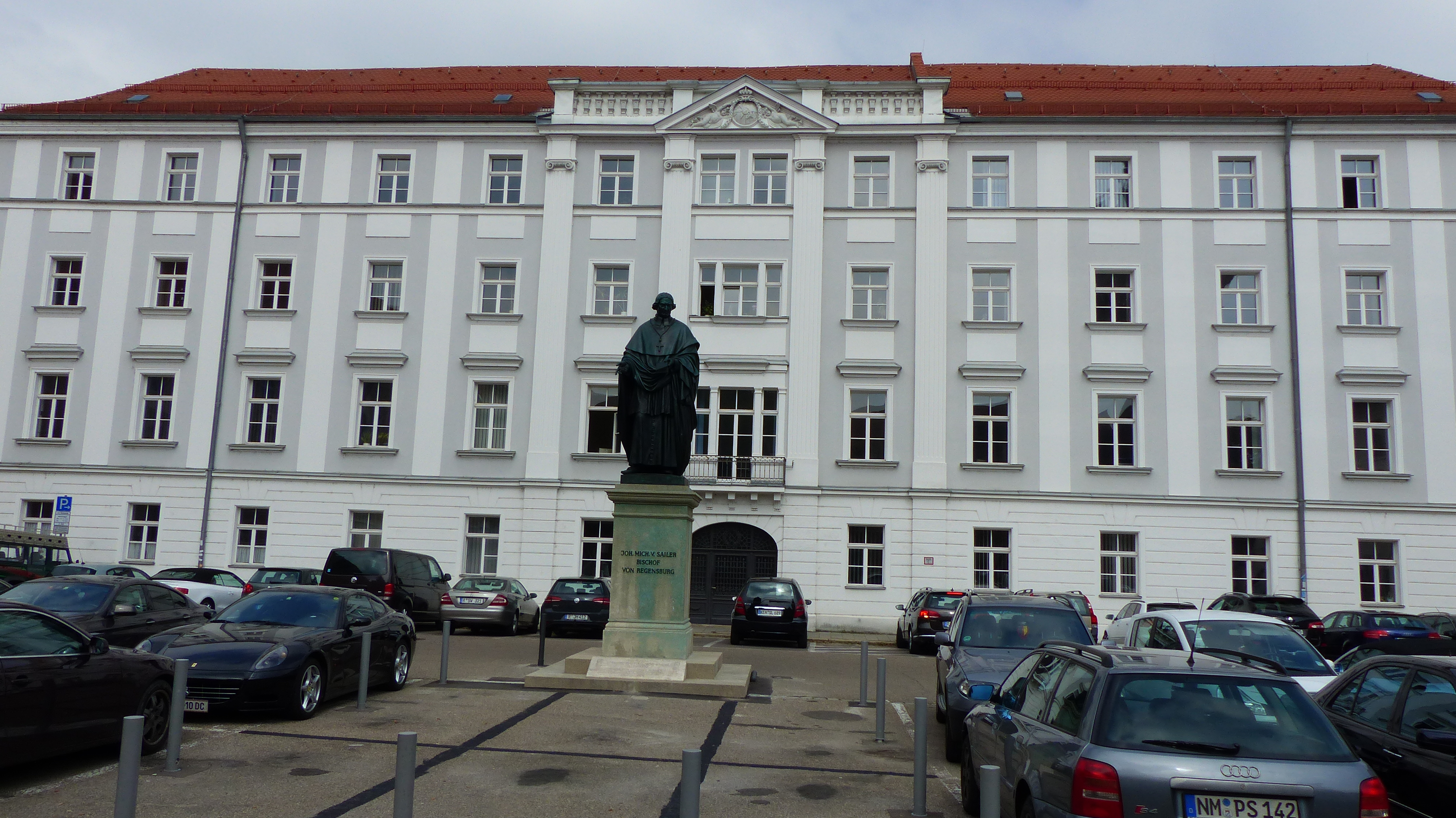 Denkmal Johann Michael Sailer, Bischof von RegensburgThis is a photograph of an architectural monument.